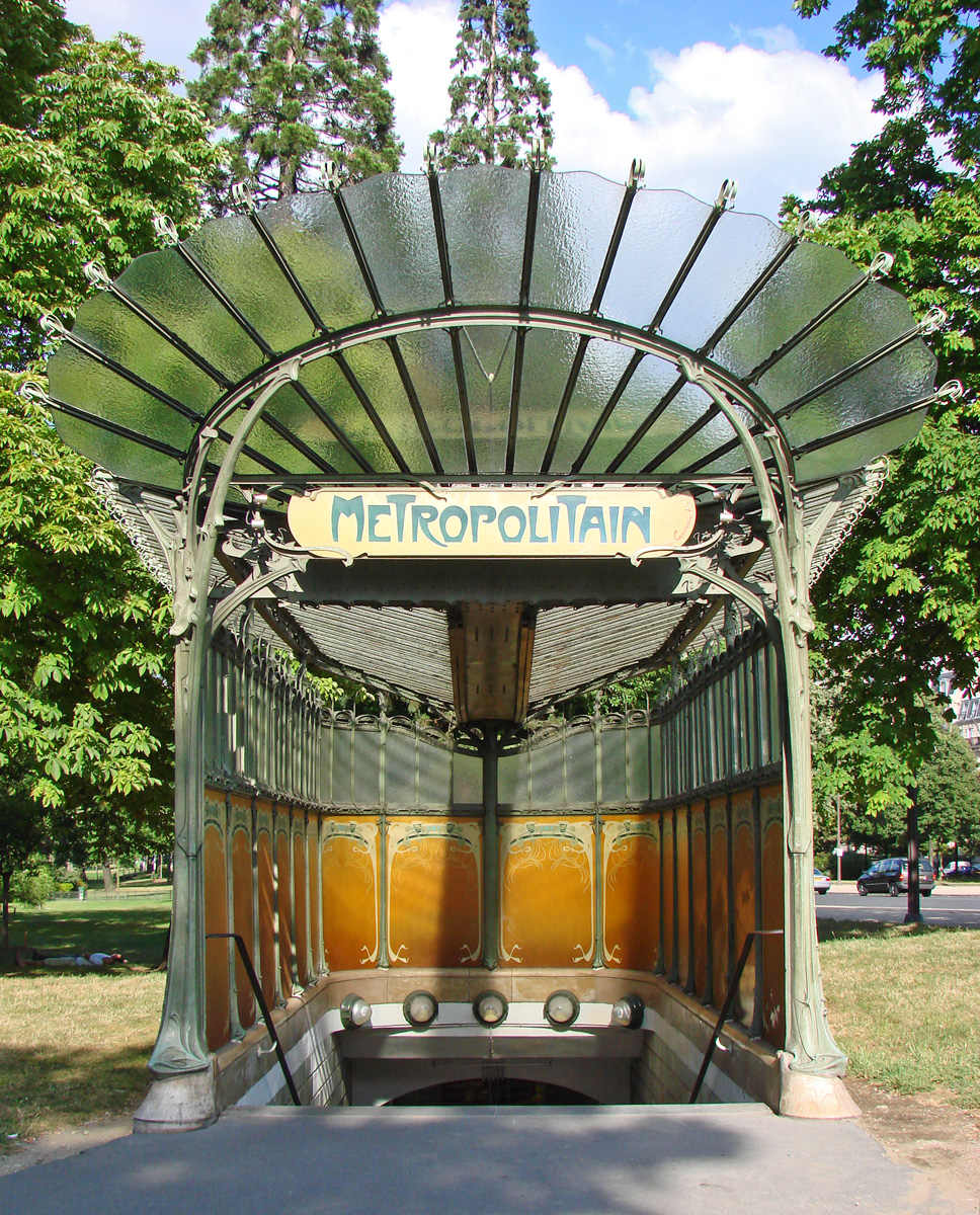 PORTE DAUPHINE - Place du Paraguay Station ouverte en 1900. C'est le plus bel édicule conçu par Hector Guimard (1867-1942 ) à Paris.